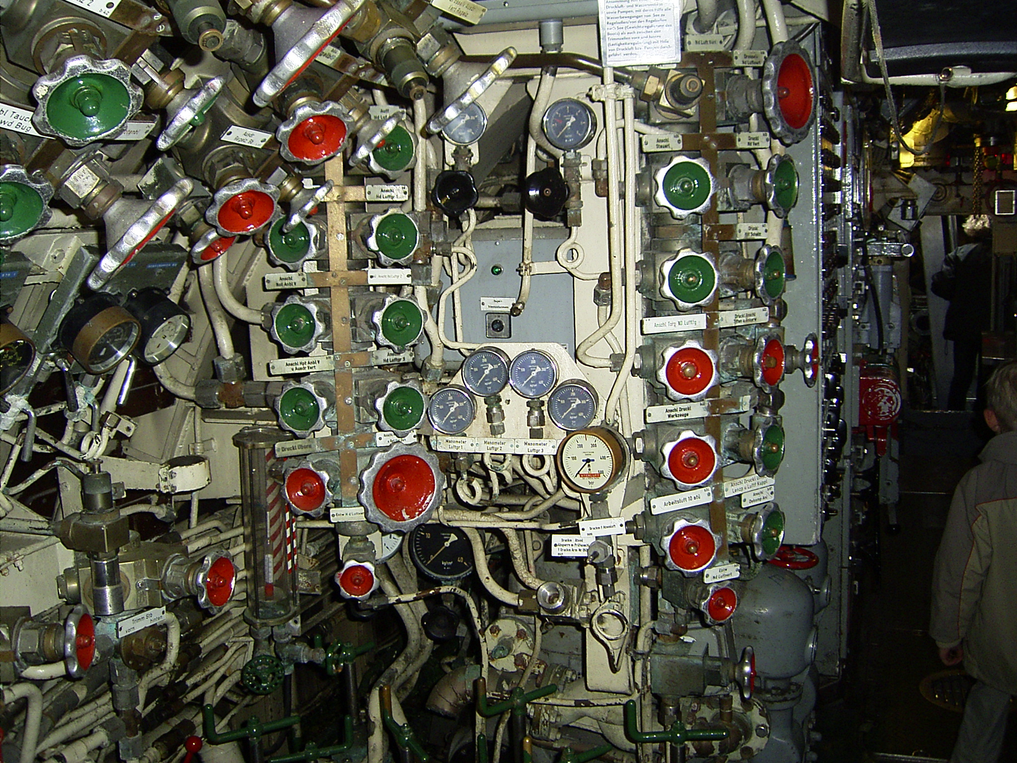 regelventile für die Druckluftanlage an bord von U 10 (Klasse 205) der deutschen Bundesmarine. Aufgenommen im Marinemuseum Wilhelmshaven